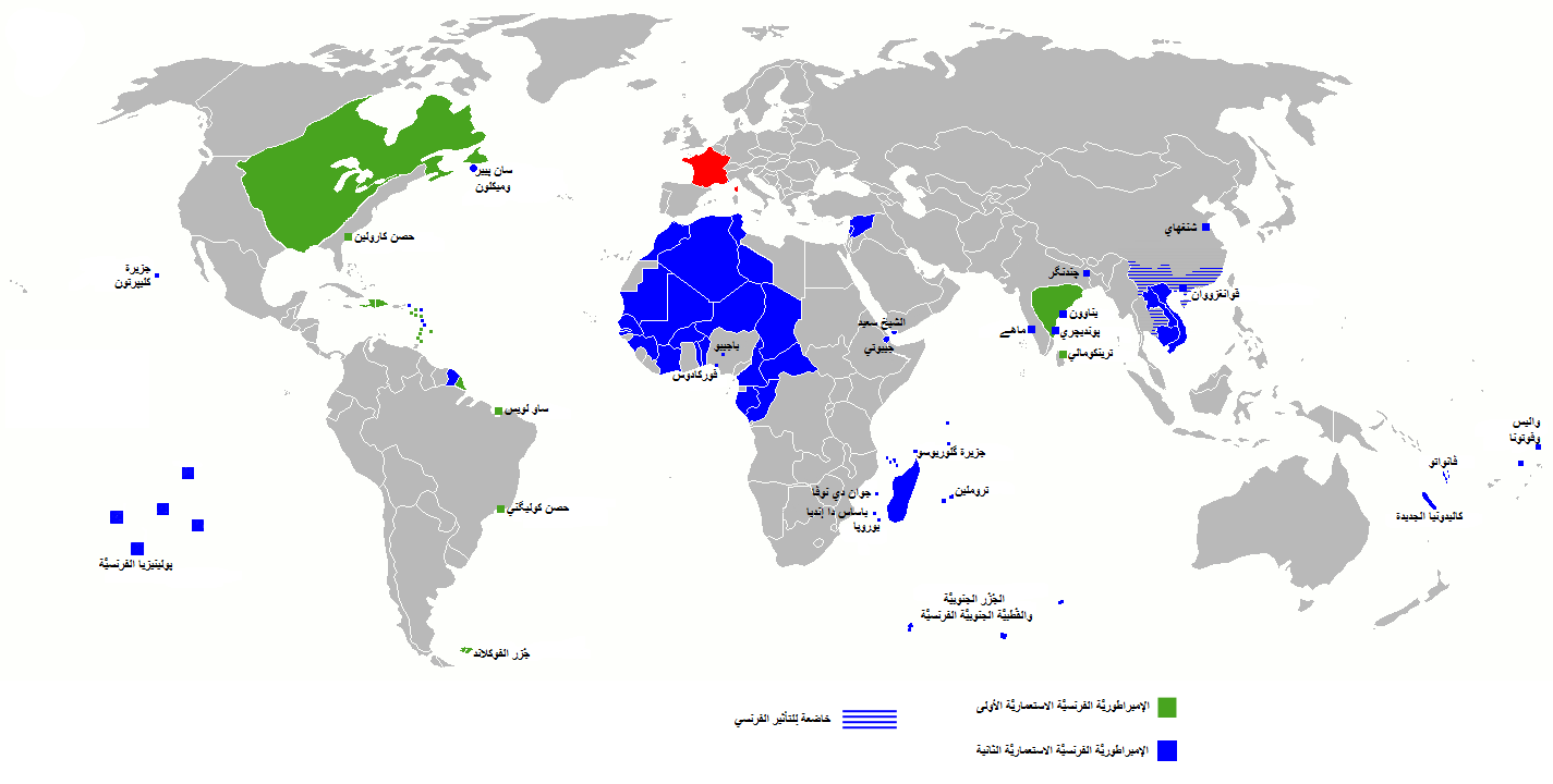 خريطة الإمبراطوريَّة الفرنسيَّة الاستعماريَّة الأولى والثانية.